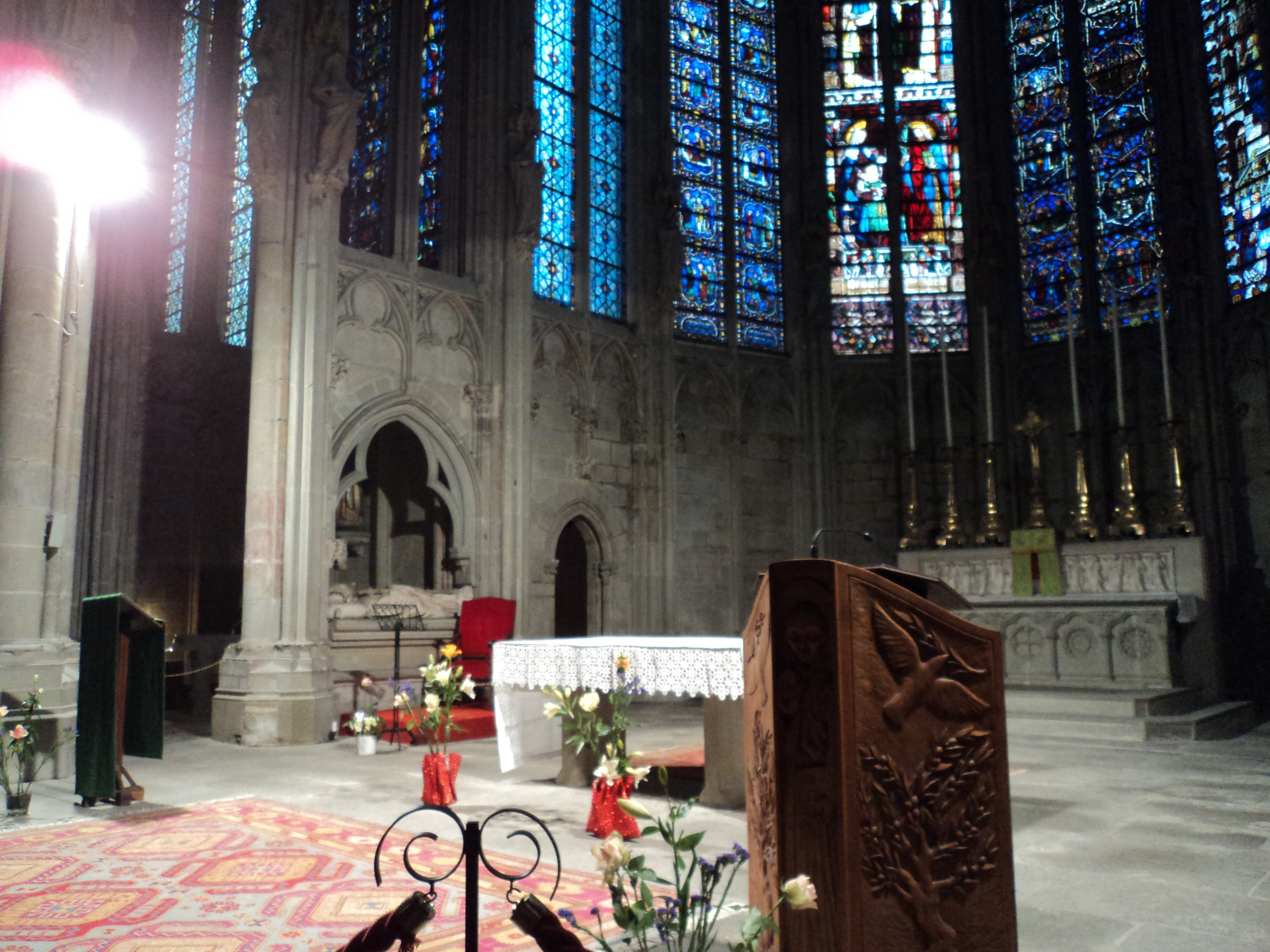 Interior de la Basílica Cite de Carcassonne (En Francés)